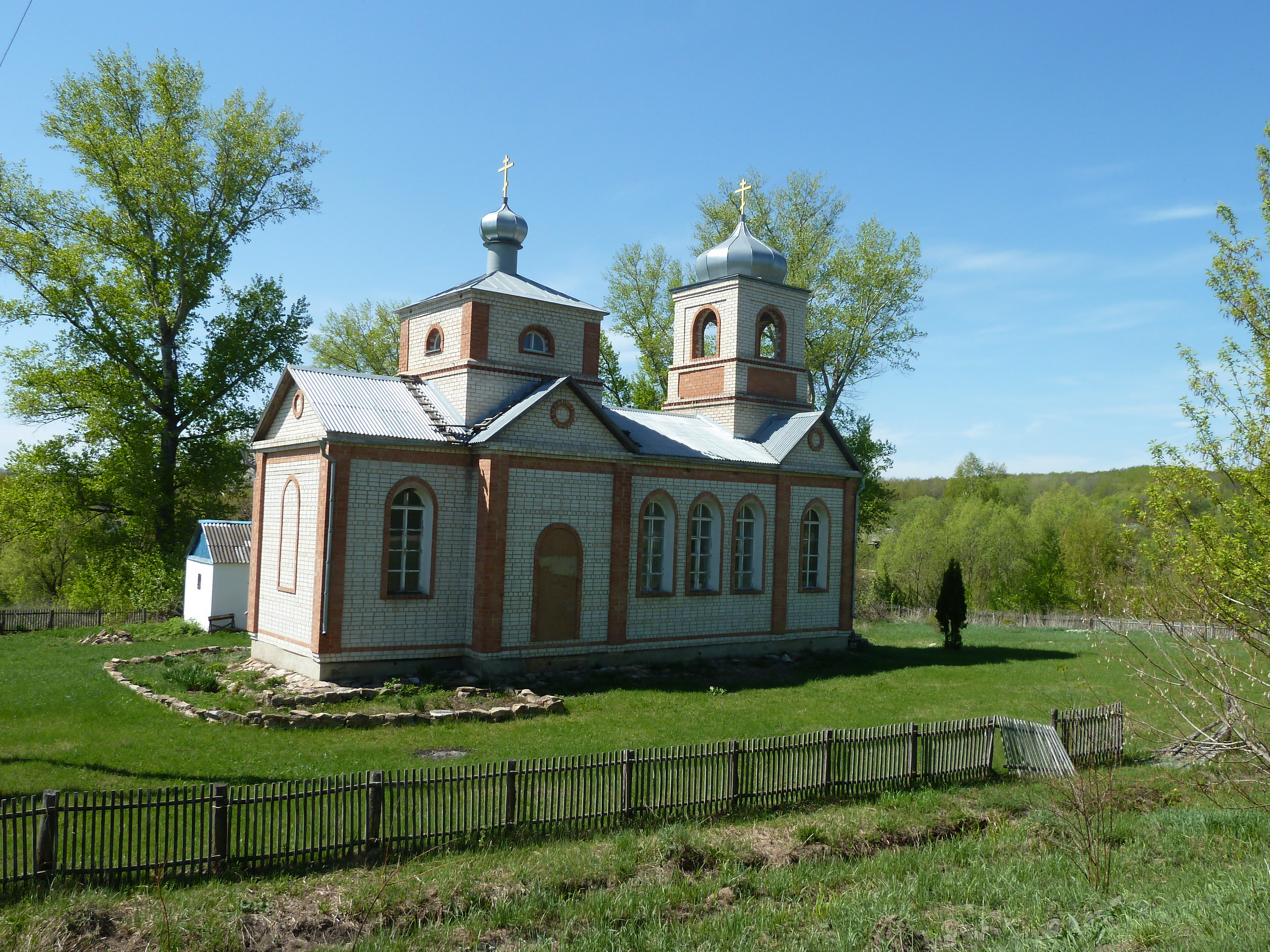 Козьмодемьянская церковь в Селезнёво (новая (2005), кирпичная).